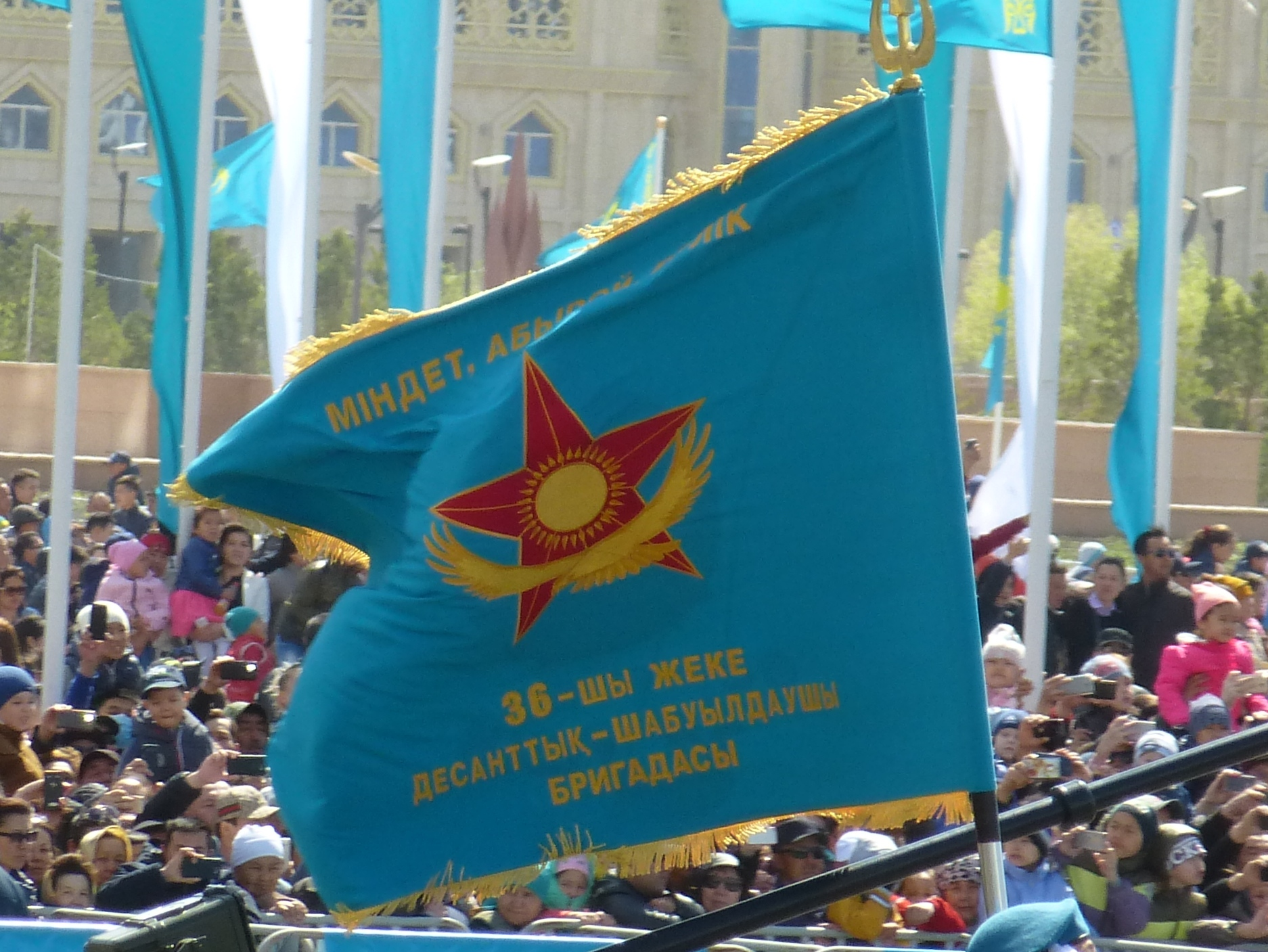 Боевое знамя 36-й десантно-штурмовой бригады. 7 мая 2017 года. Нур-Султан